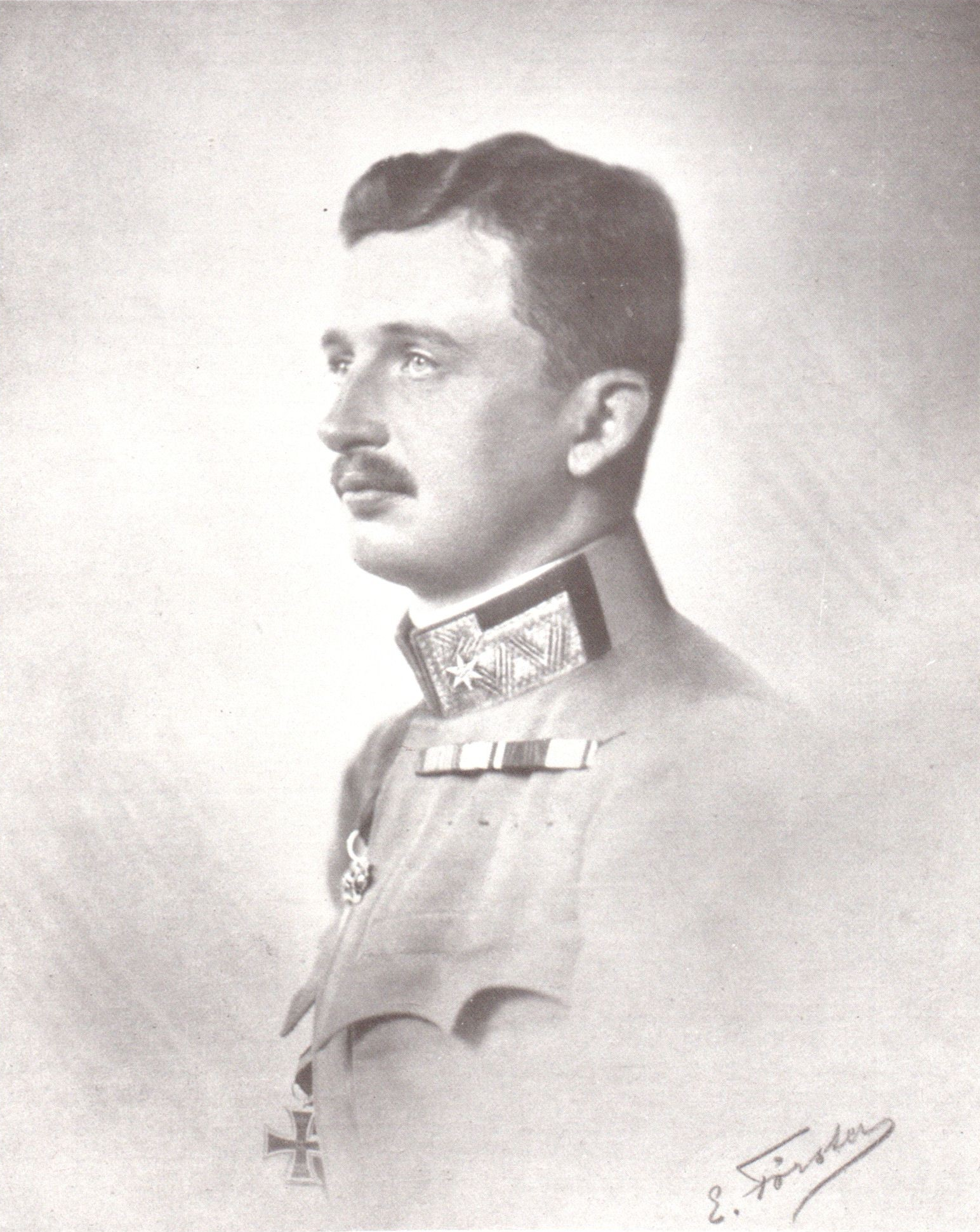 „Se. k. und k. Hoheit FML. Erzherzog Karl Franz Josef, der siegreiche Führer der aus dem Astach- und dem Laintal vorgedrungenen Kräfte“